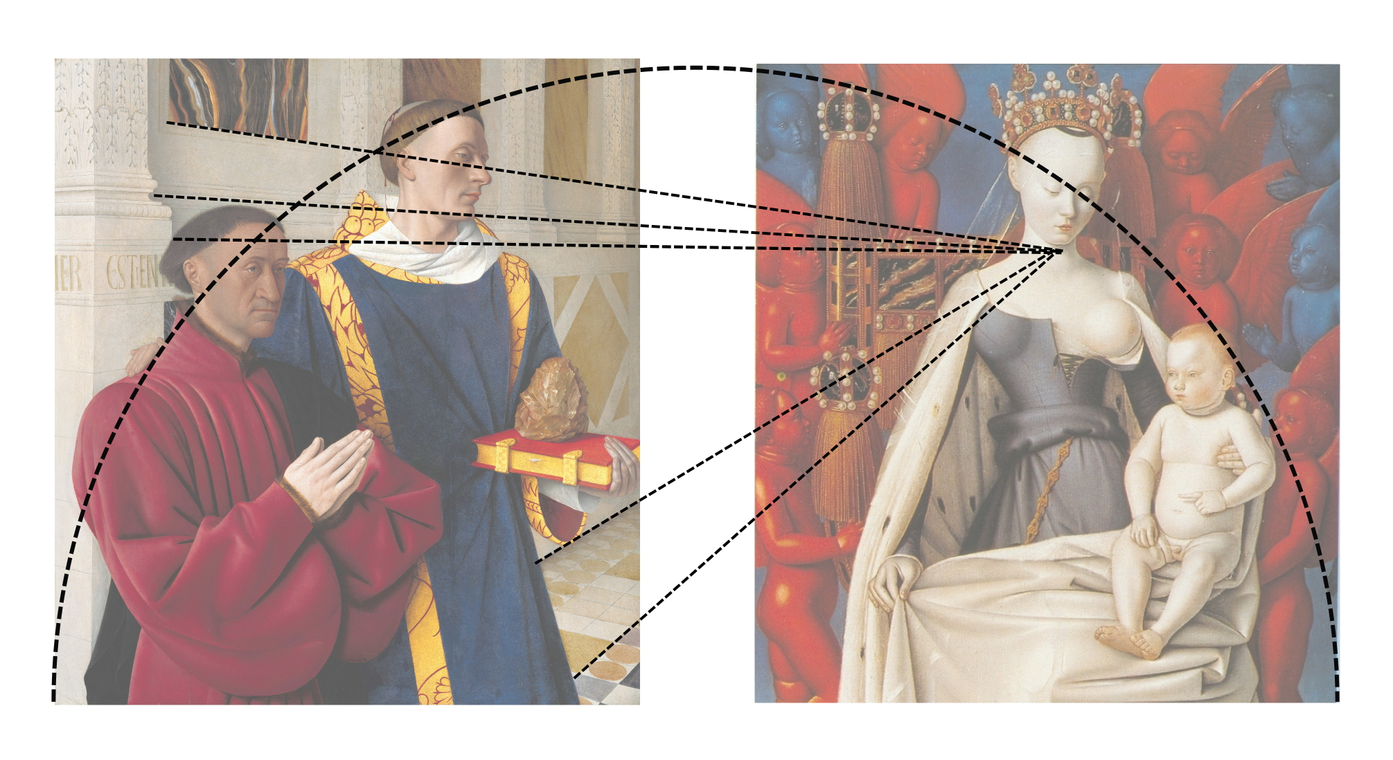 Composition géométrique du diptyque de Melun